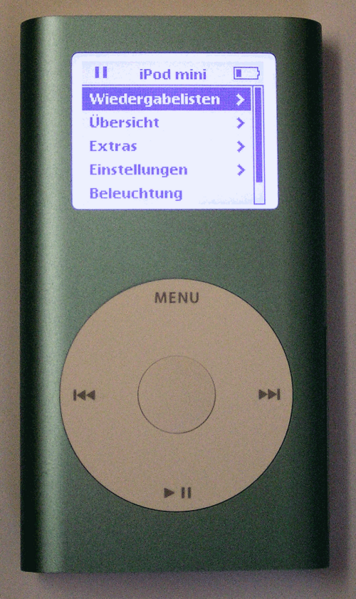 (from Wikipedia de) Beschreibung: iPod mini von Apple (MP3-Player) Quelle: Fotografiert im August 2004 Fotograf: Martin Steiger